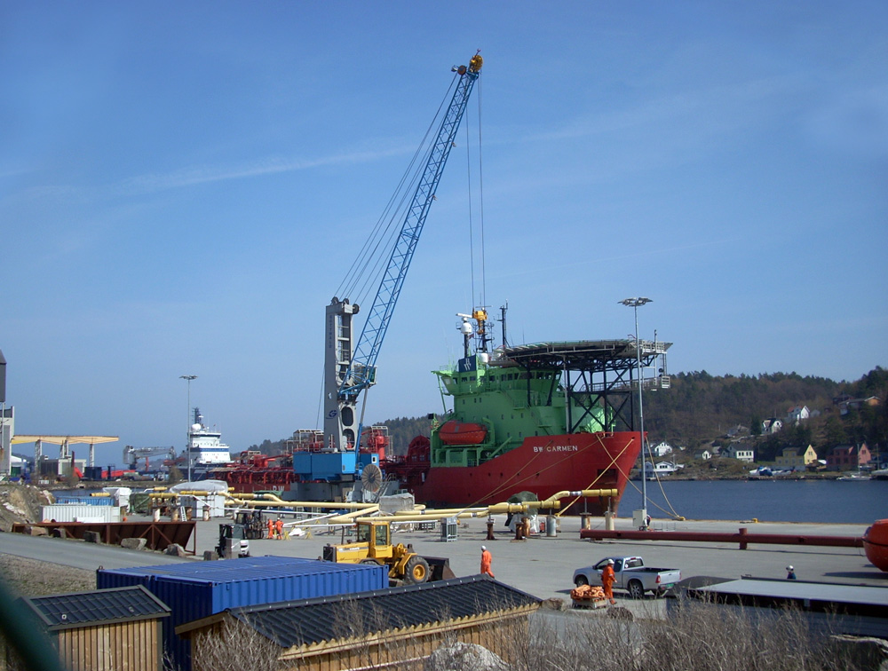 Arendal regionhavn på Eydehavn, Arendal.